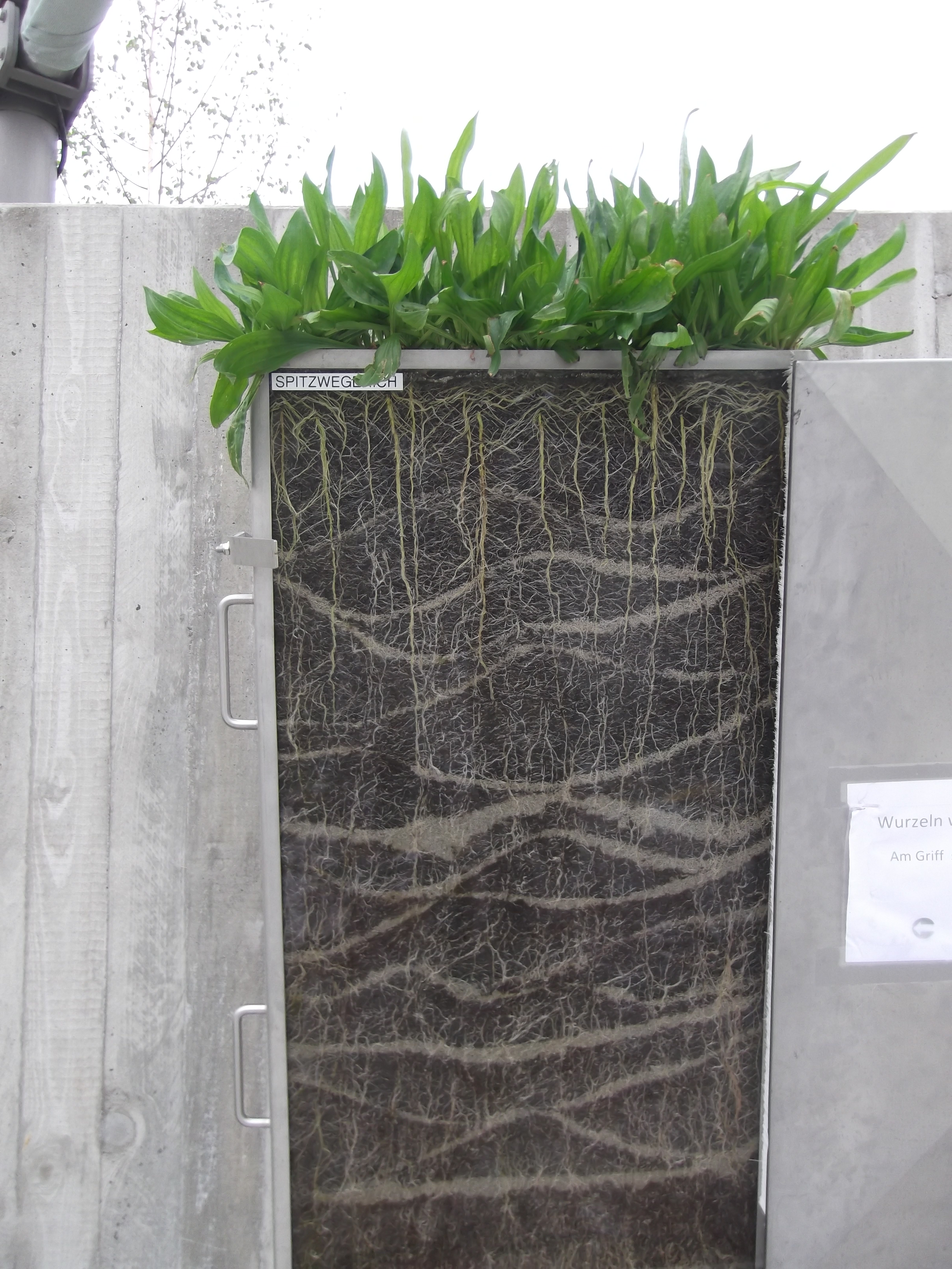 Wurzeln des Spitzwegerichs (lateinisch: Plantago lanceolata) in einem Schaukasten. Aufgenommen auf der Landesgartenschau Schwäbisch Gmünd im Mai 2014.